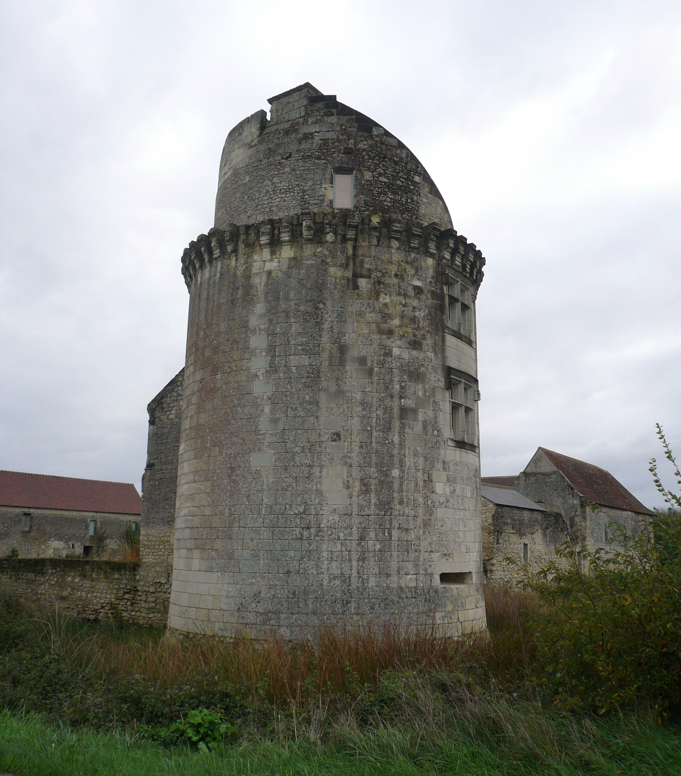 Tour sud-ouest du château de l'étang, Bossée, Indre-et-Loire, Centre, France.